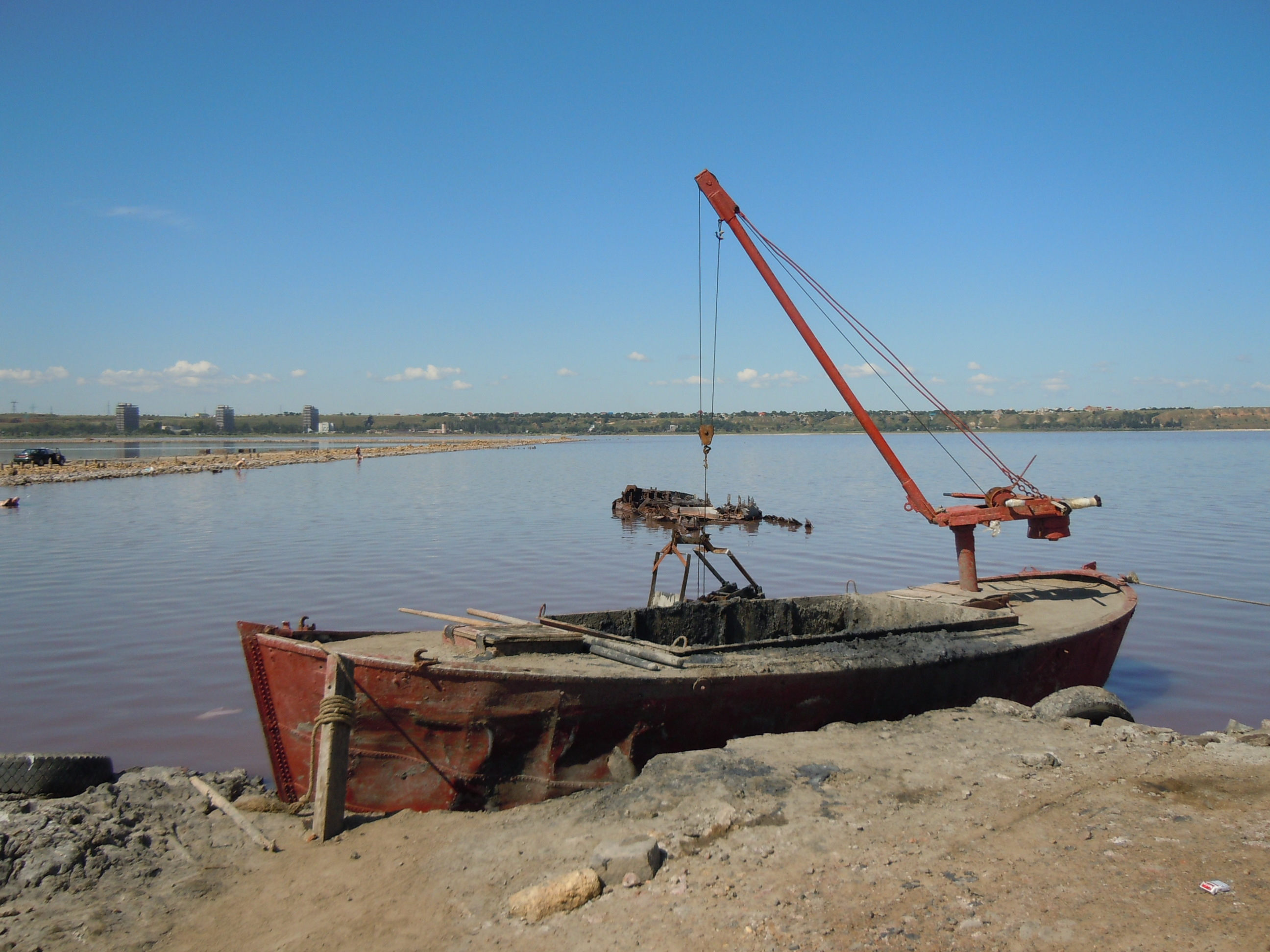 Добування лікувальної грязі на Куяльницькому лимані